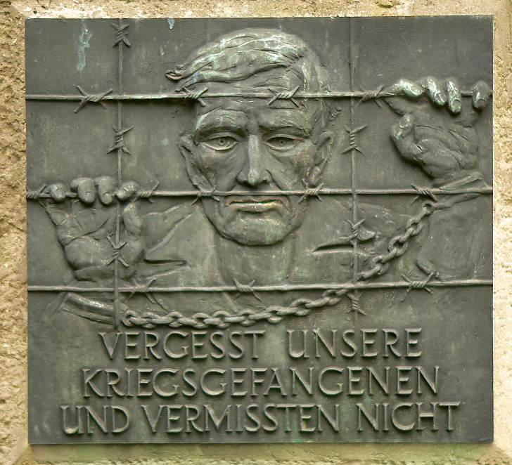 Denkmal Kriegsgefangener Neustadt